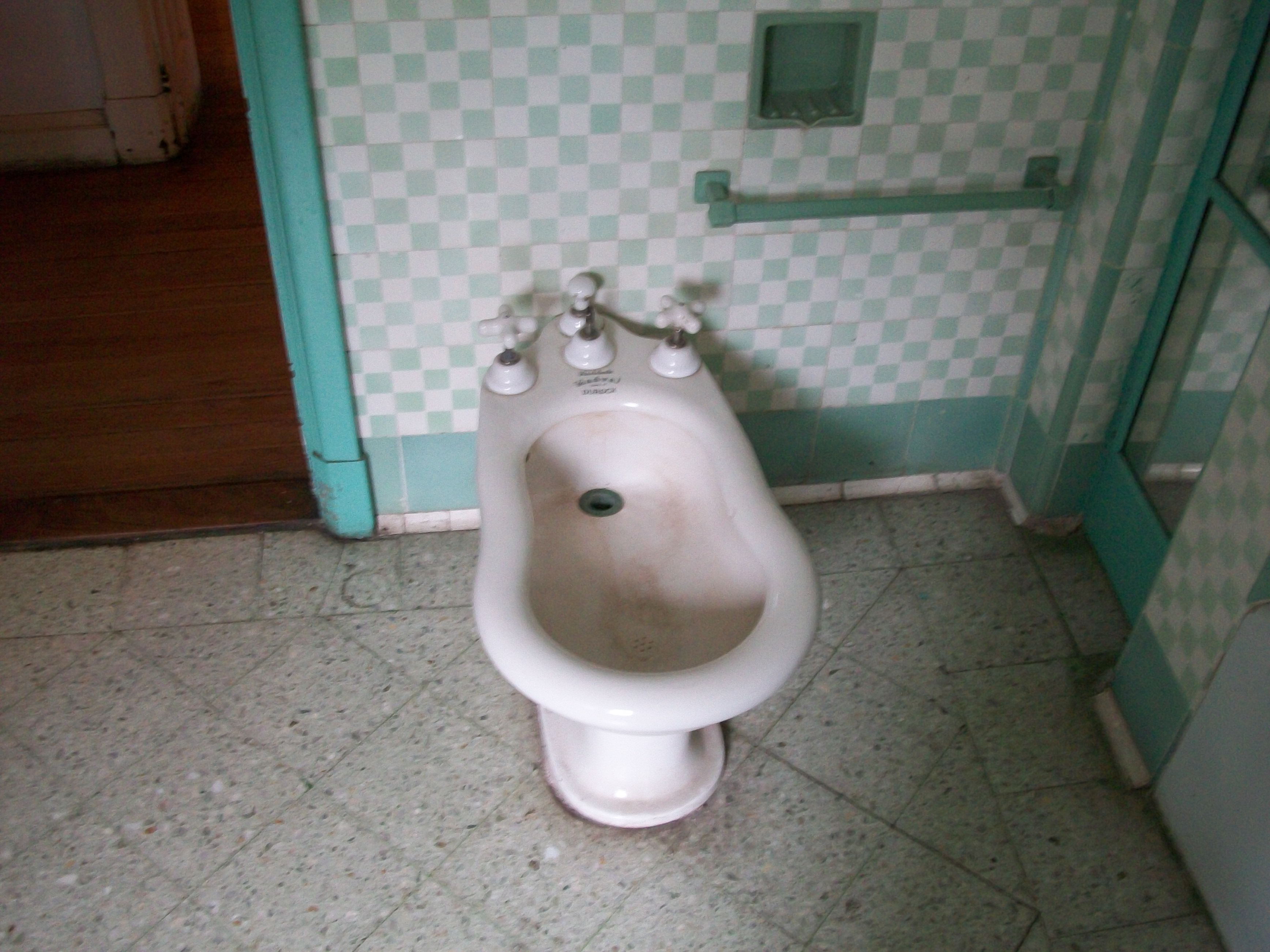 Museo Hist¾rico Municipal Don Rodolfo T. Barili, Mar del Plata, Argentina